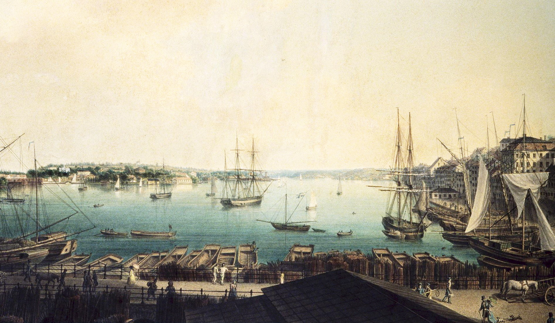 Utsikt från Slussen med Järnvågen mot Saltsjön (bilden är beskuren).